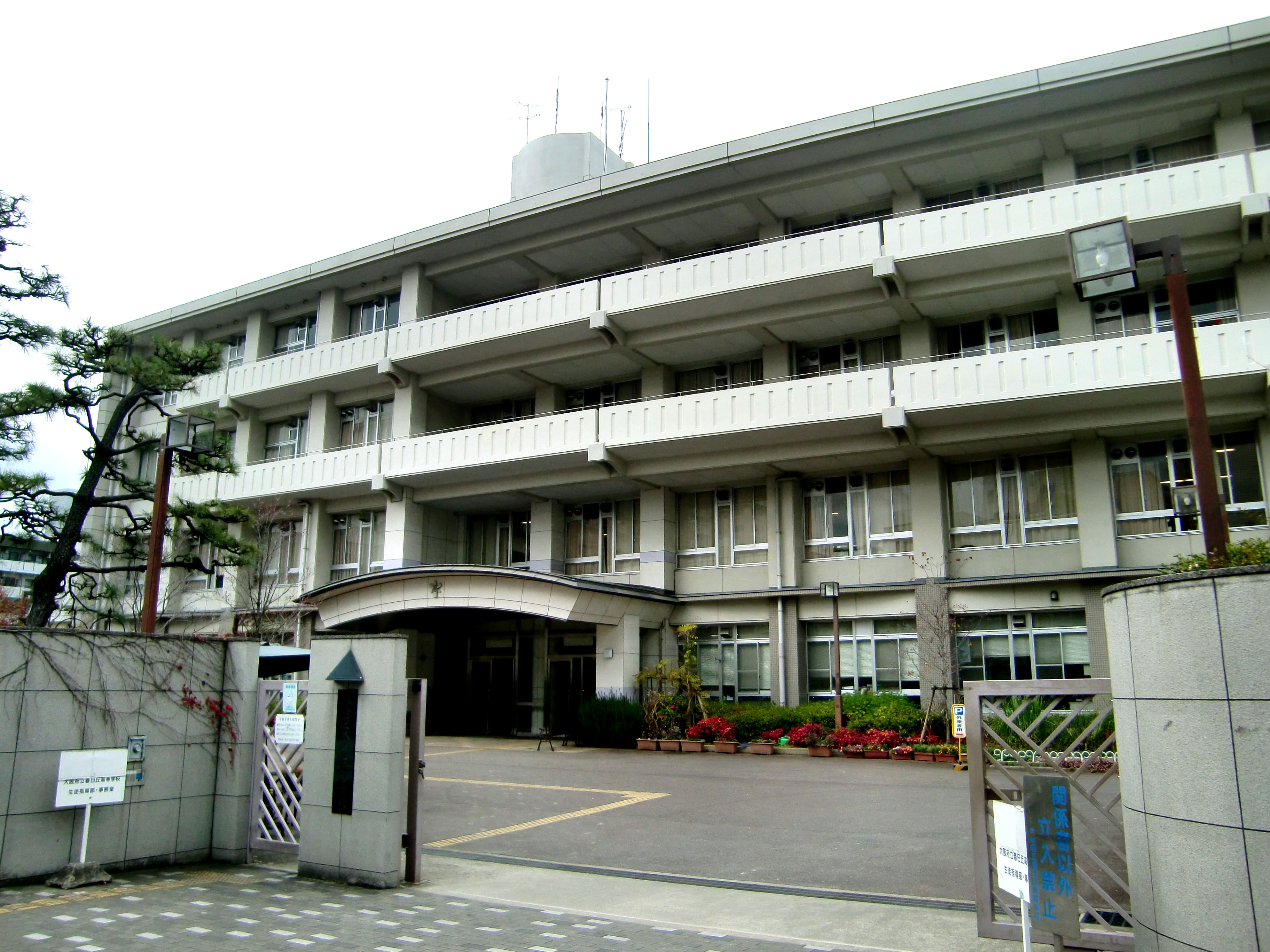 Kasugaoka High School,Kasuga Ibaraki-City Osaka Japan.